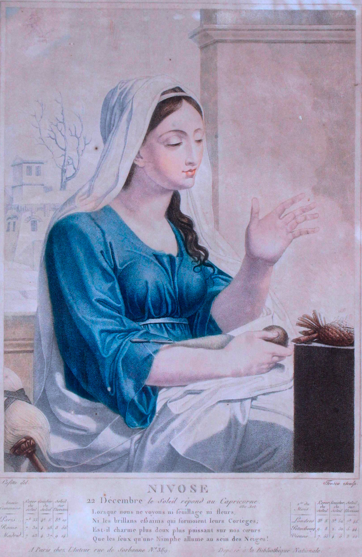 Auteur: Louis Lafitte (1770-1828); allégorie pour le mois de Nivôse. Domaine public français, bibliothèque nationale & Bureau des Longitudes. En filigrane, en haut à gauche, le capricorne, secteur du zodiac où se trouve le Soleil à cette période de l'année.